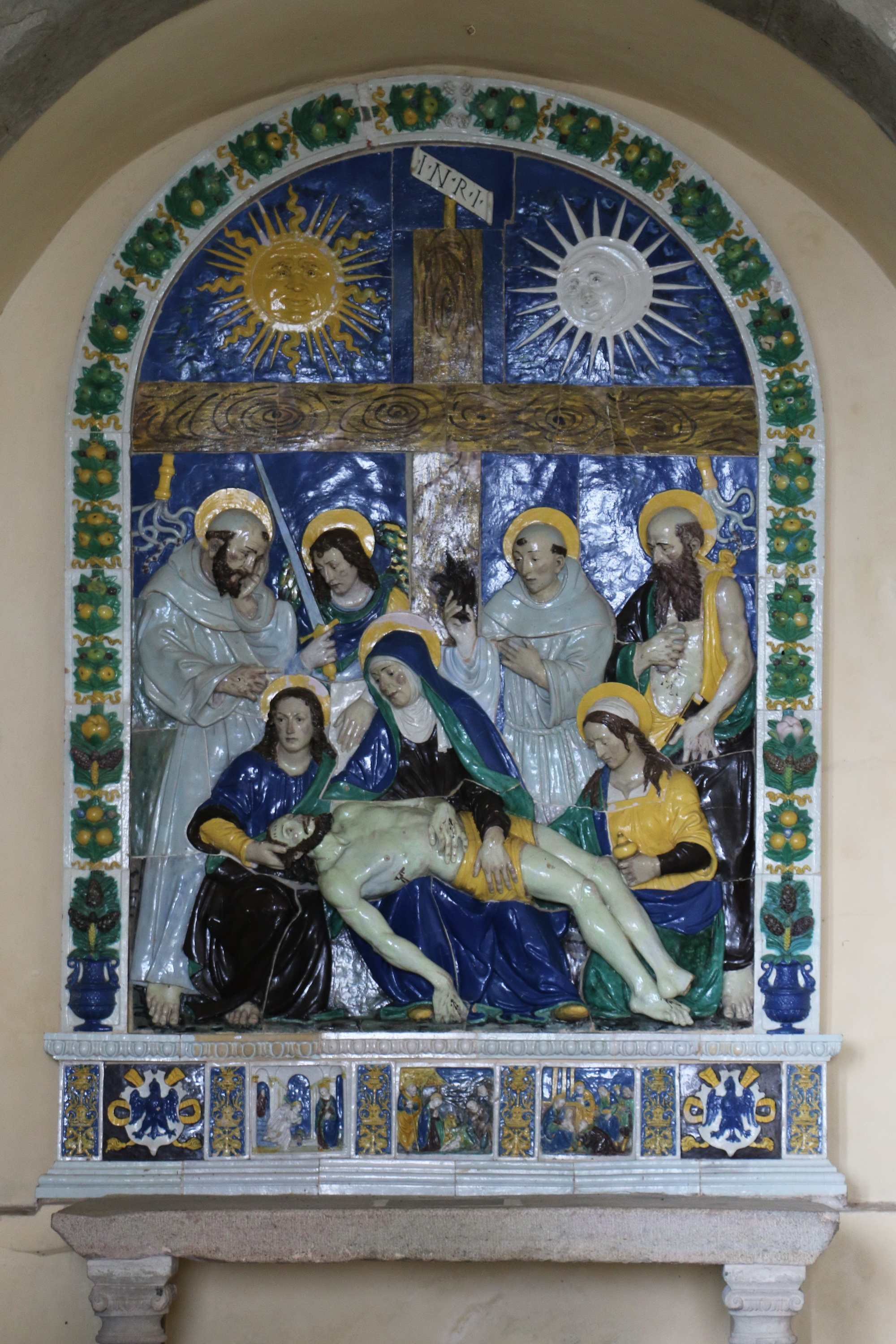 Glazed terracotta 'Deposizione di Gesù della Croce' / 'Pietà' by Santi Buglioni Cappella della Pietà, Santuario Francescano della Verna, Chiusi della Verna, Tuscany, Italy Santuary of Verna Native nameSantuario della VernaLocationChiusi della Verna, Tuscany, ItalyCoordinates43° 42′ 25″ N, 11° 55′ 52″ E Established1260 (Consecrated)